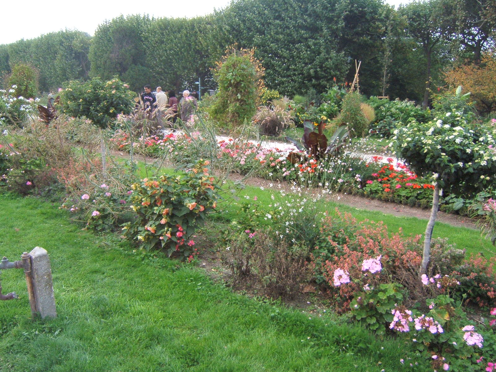 photo d'automne 2006+